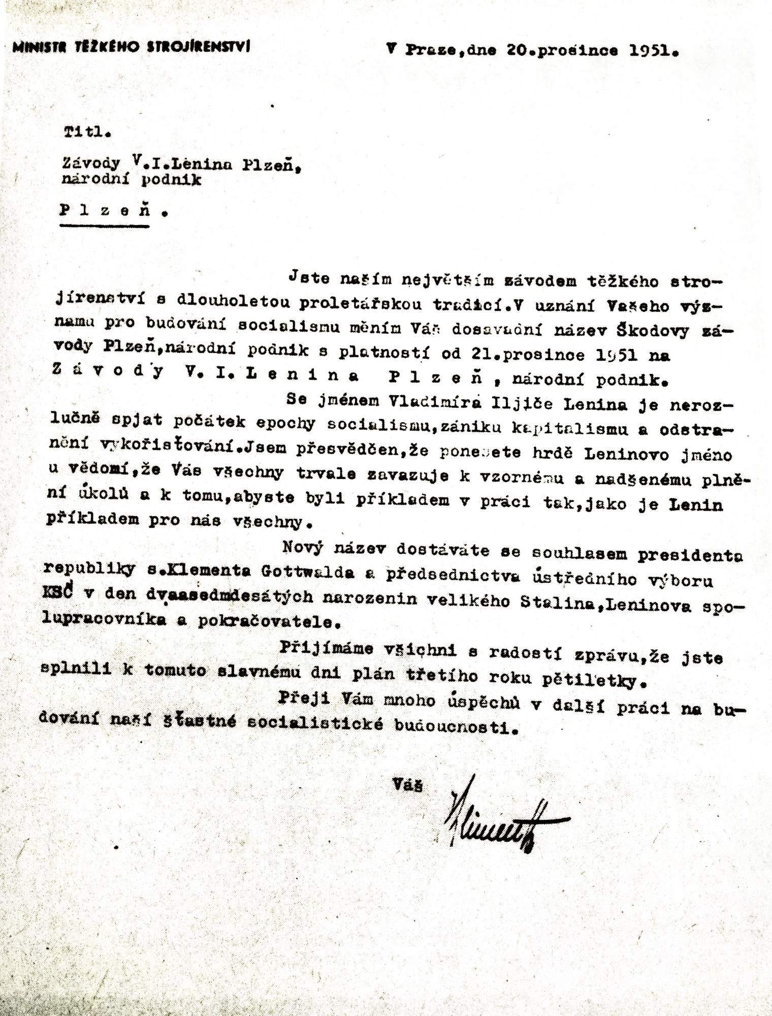 Největší strojírenský podnik Plzeňského kraje a ČSR byl přejmenován na závody V. I. Lenina